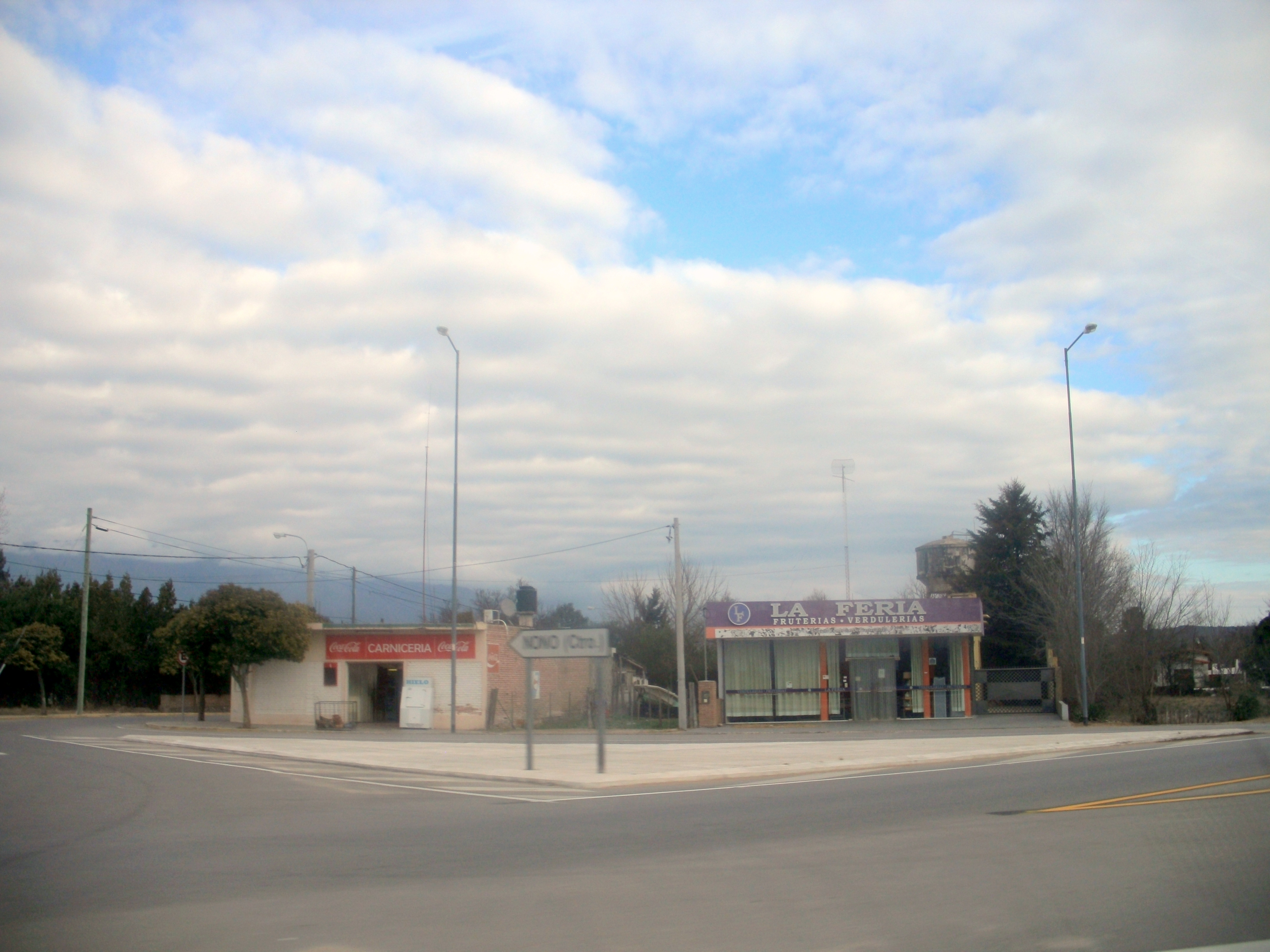 Casas de la localidad